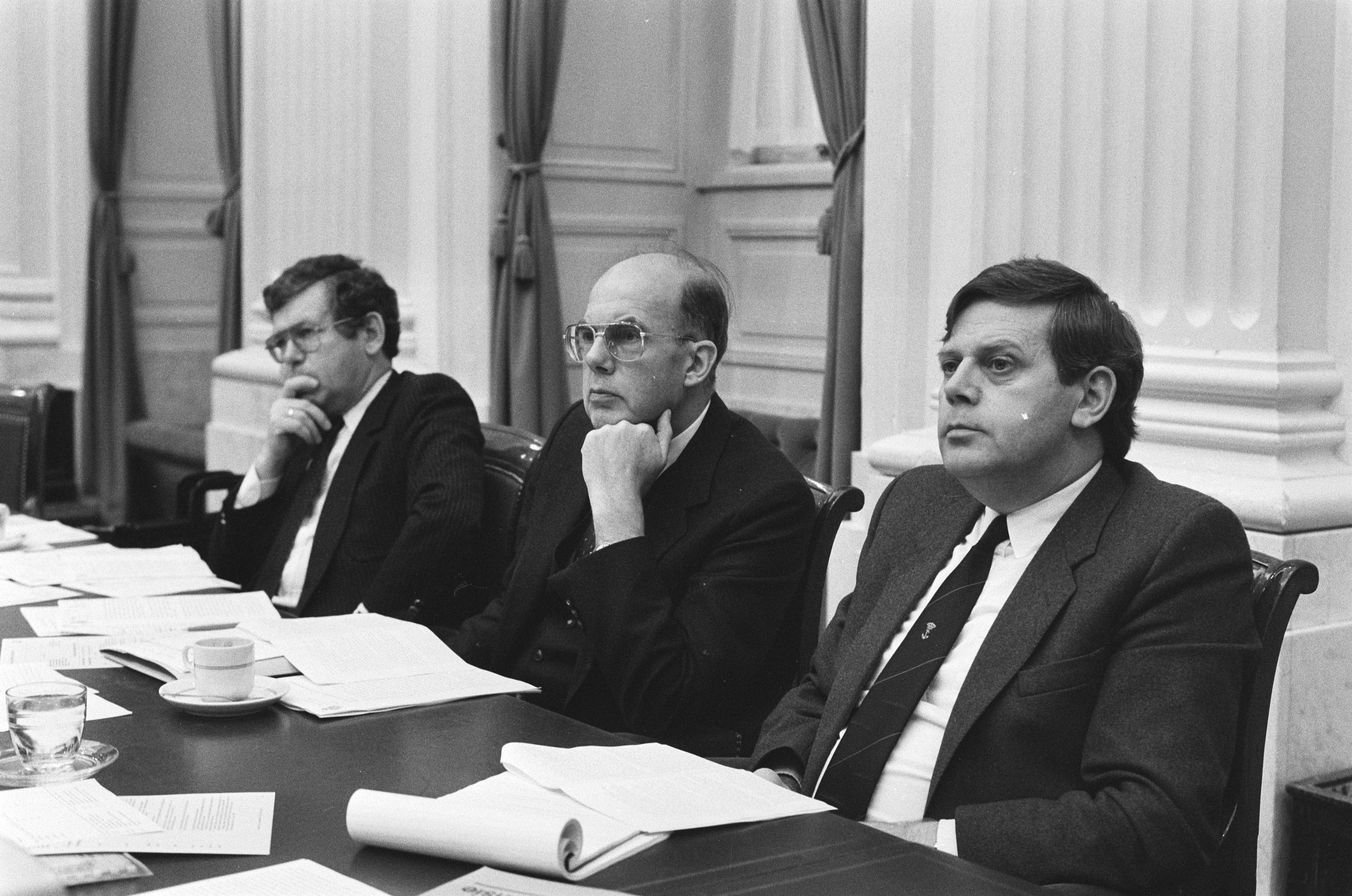 Collectie / Archief : Fotocollectie Anefo Reportage / Serie : [ onbekend ] Beschrijving : Frinking, CDA, Van Houwelingen , De Ruyter , Hoekzema (v.l.n.r.) Datum : 18 december 1985 Trefwoorden : politici Persoonsnaam : De Ruyter, Frinking Fotograaf : Croes, Rob C. / Anefo Auteursrechthebbende : Nationaal Archief Materiaalsoort : Negatief (zwart/wit) Nummer archiefinventaris : bekijk toegang 2.24.01.05 Bestanddeelnummer : 933-5192